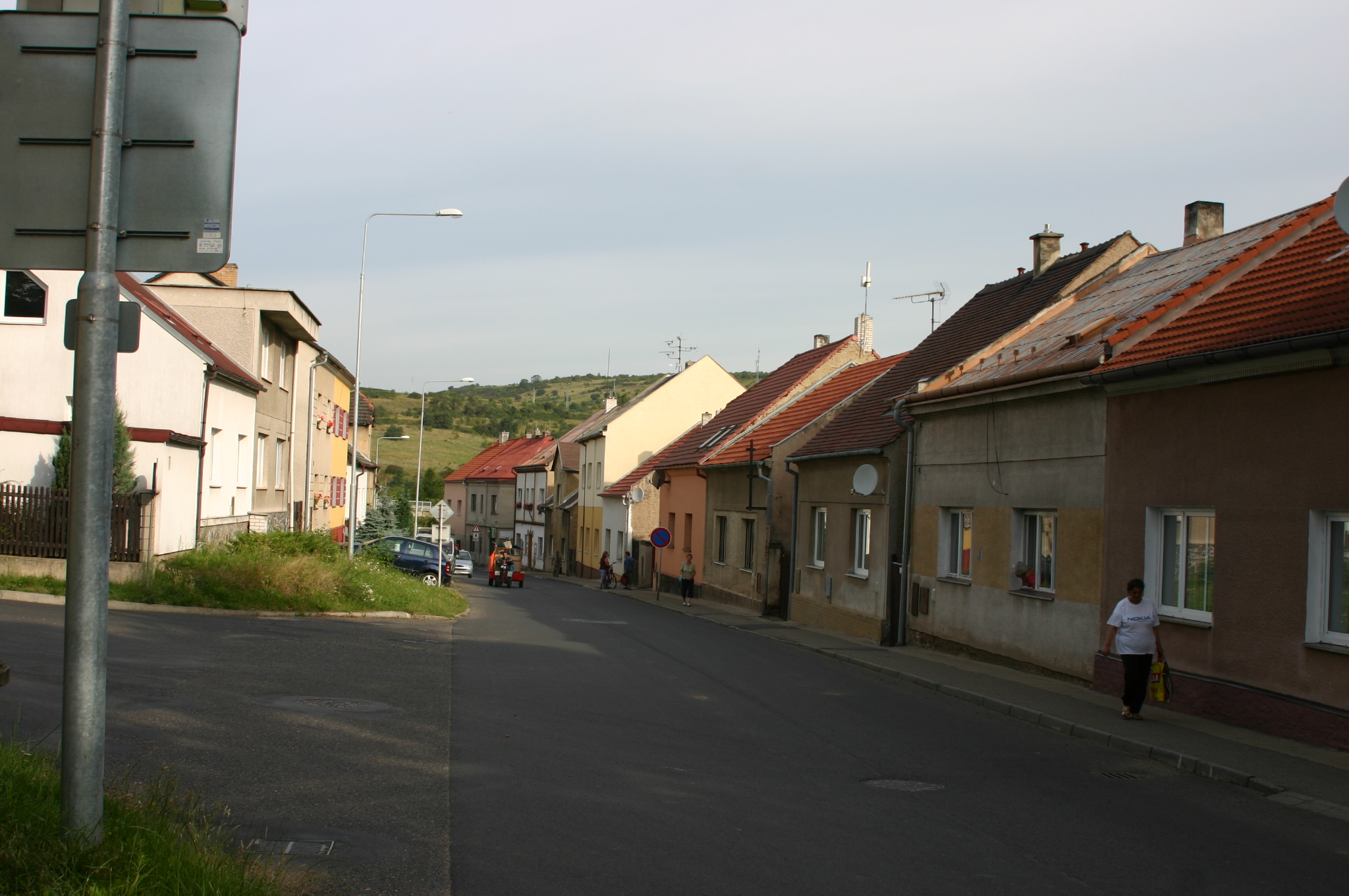 Obec Obrnice v okrese Most (Mírová ul.)